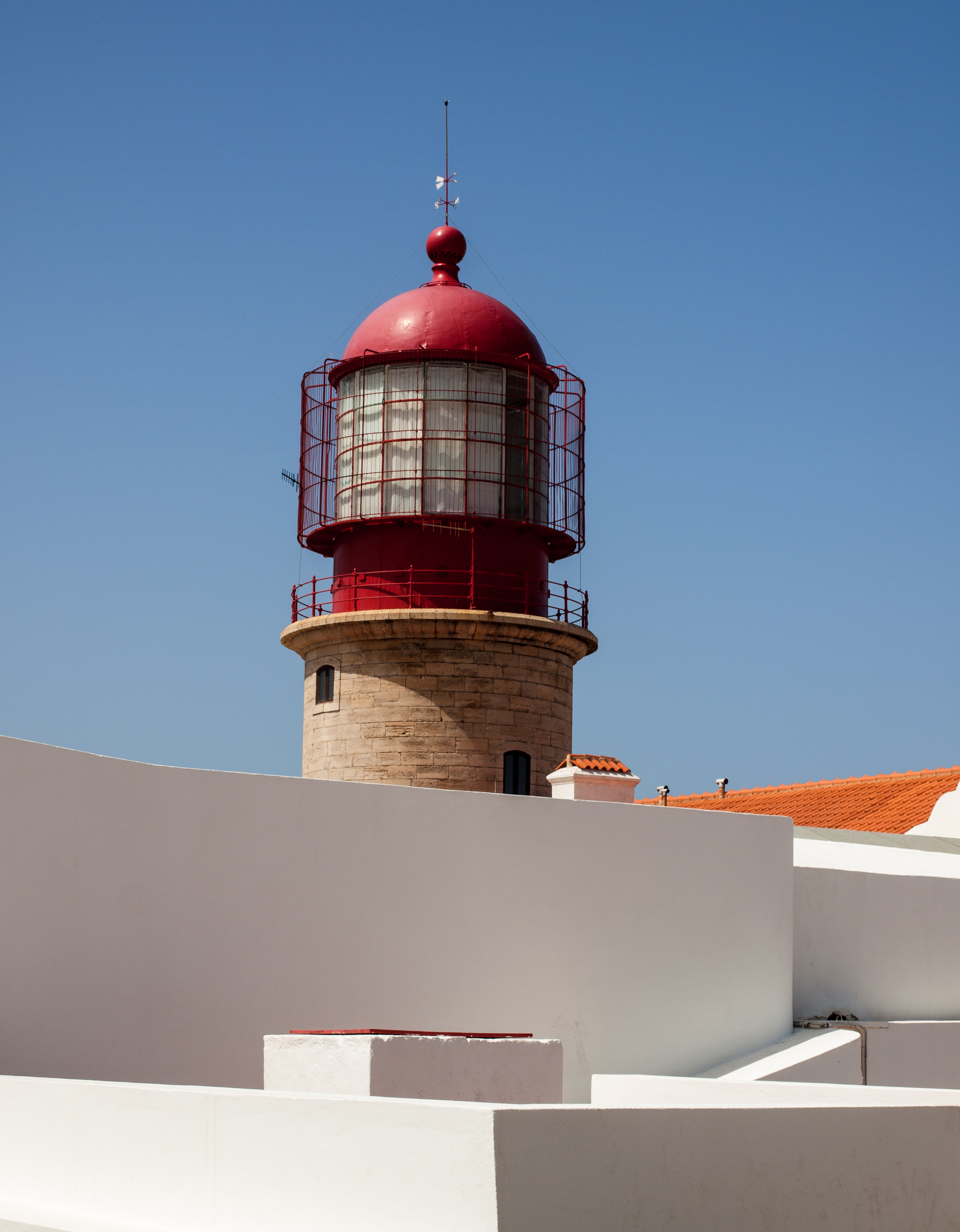 Portugal 2012